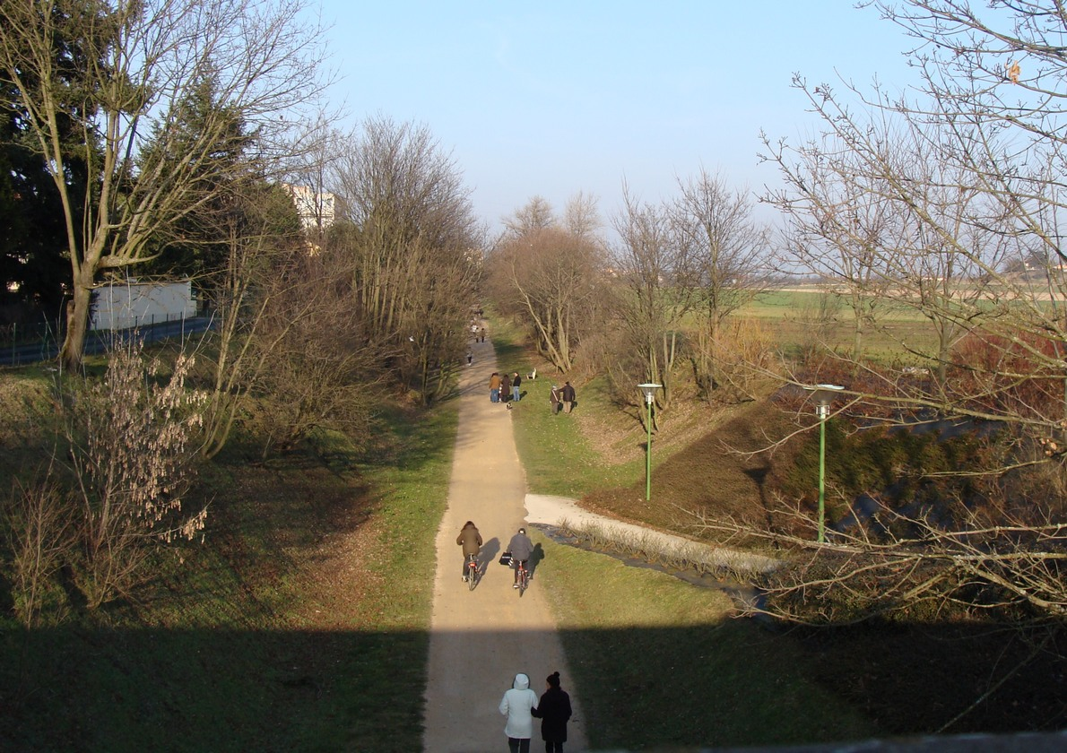 La "voie verte" de Caluire (Rhône), ancienne plateforme de la ligne de chemin de fer de Lyon à Trévoux.